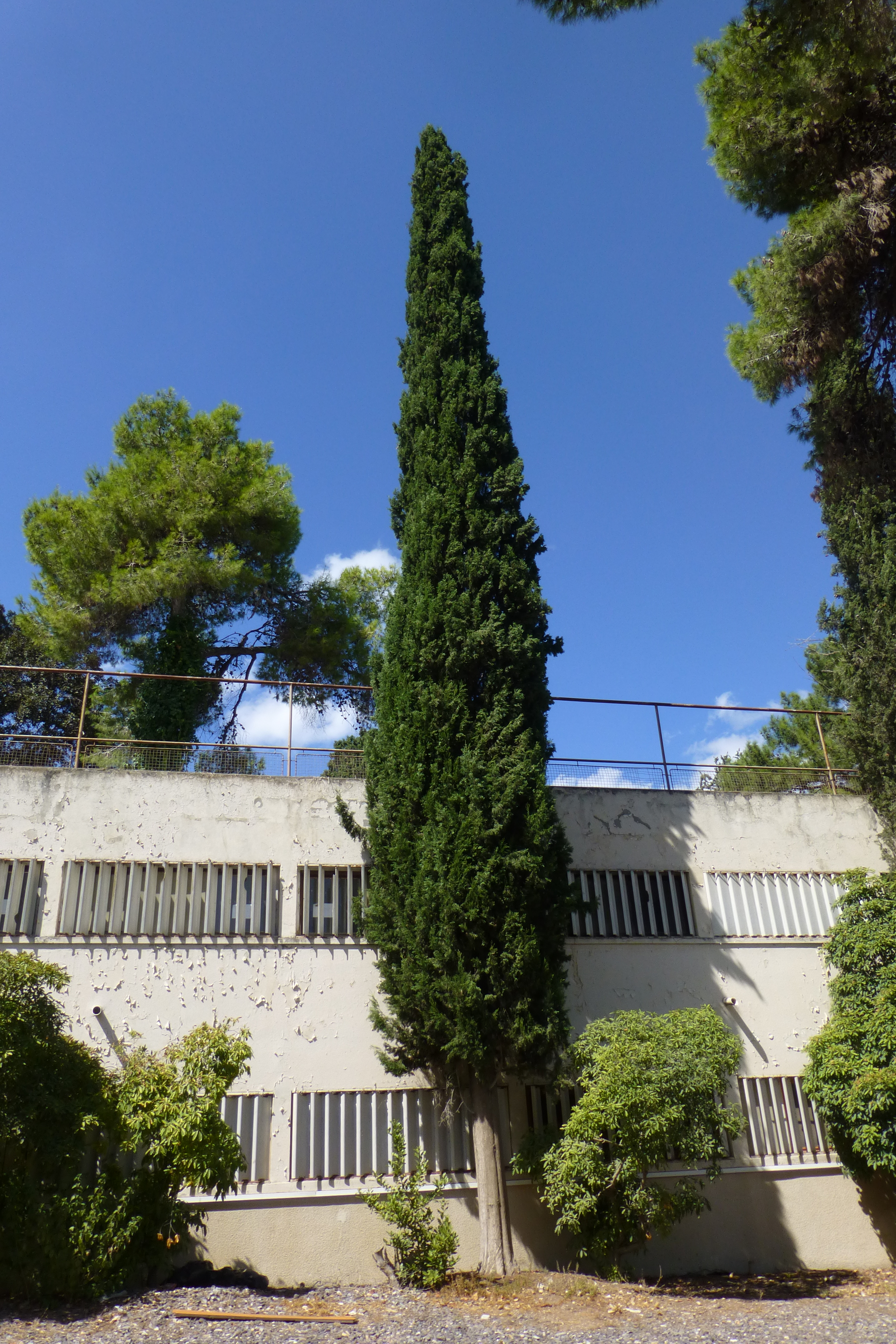 מוסד שומריה הוקם בשנת 1931 בקיבוץ משמר העמק והיה למוסד החינוכי הראשון של השומר הצעיר.